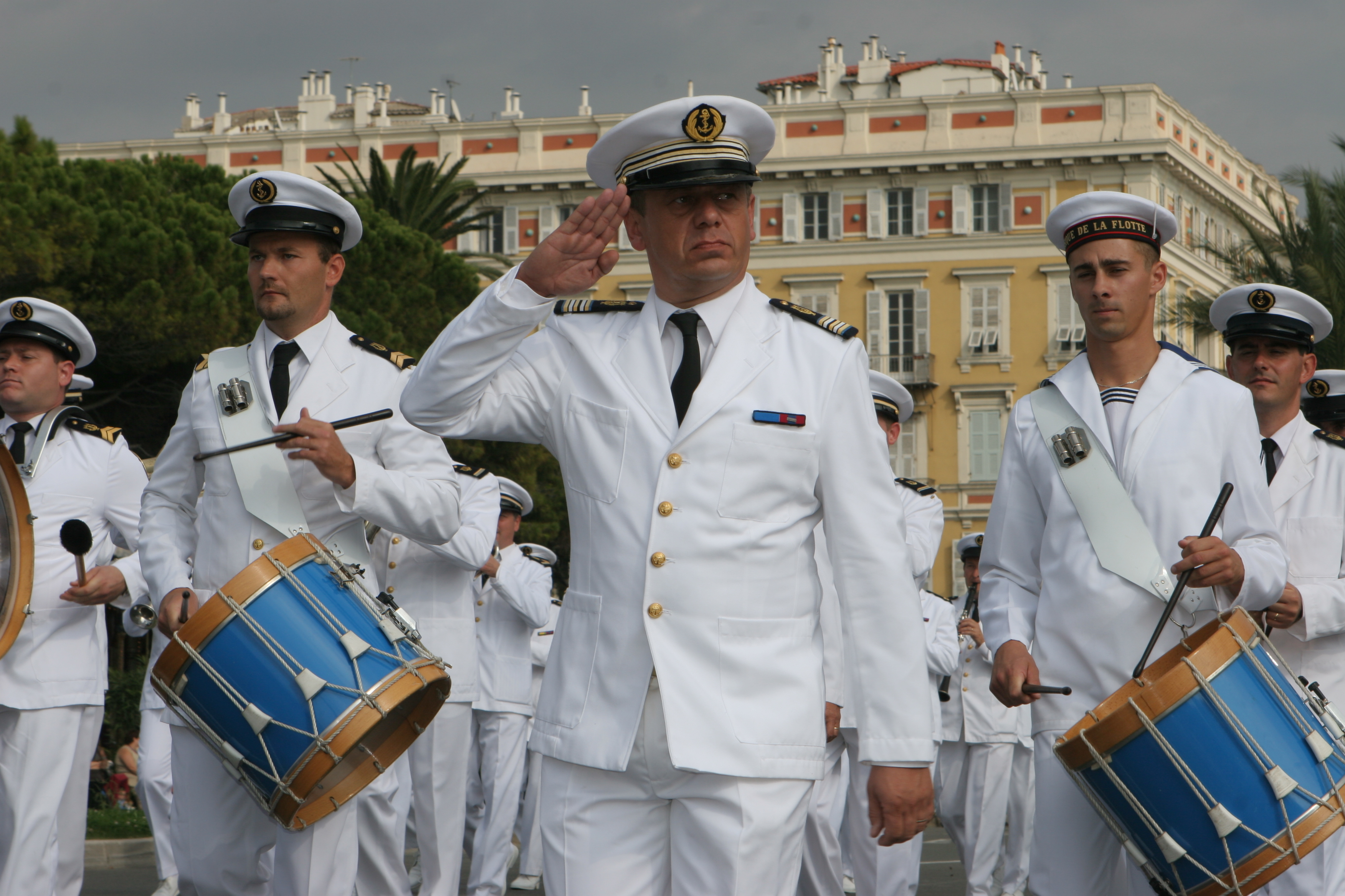 Musique des équipages de la flotte (Marine nationale française) lors du festival de musiques militaires de Nice le 6 octobre 2007